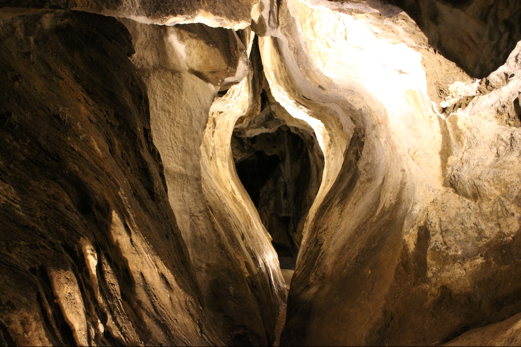 jeskyně Na Špičáku, okres Jeseník, Olomoucký kraj